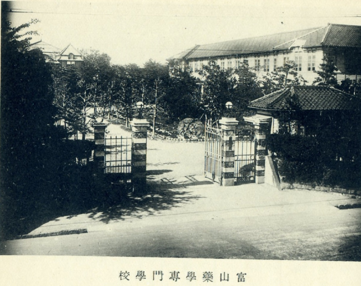 富山薬業専門学校